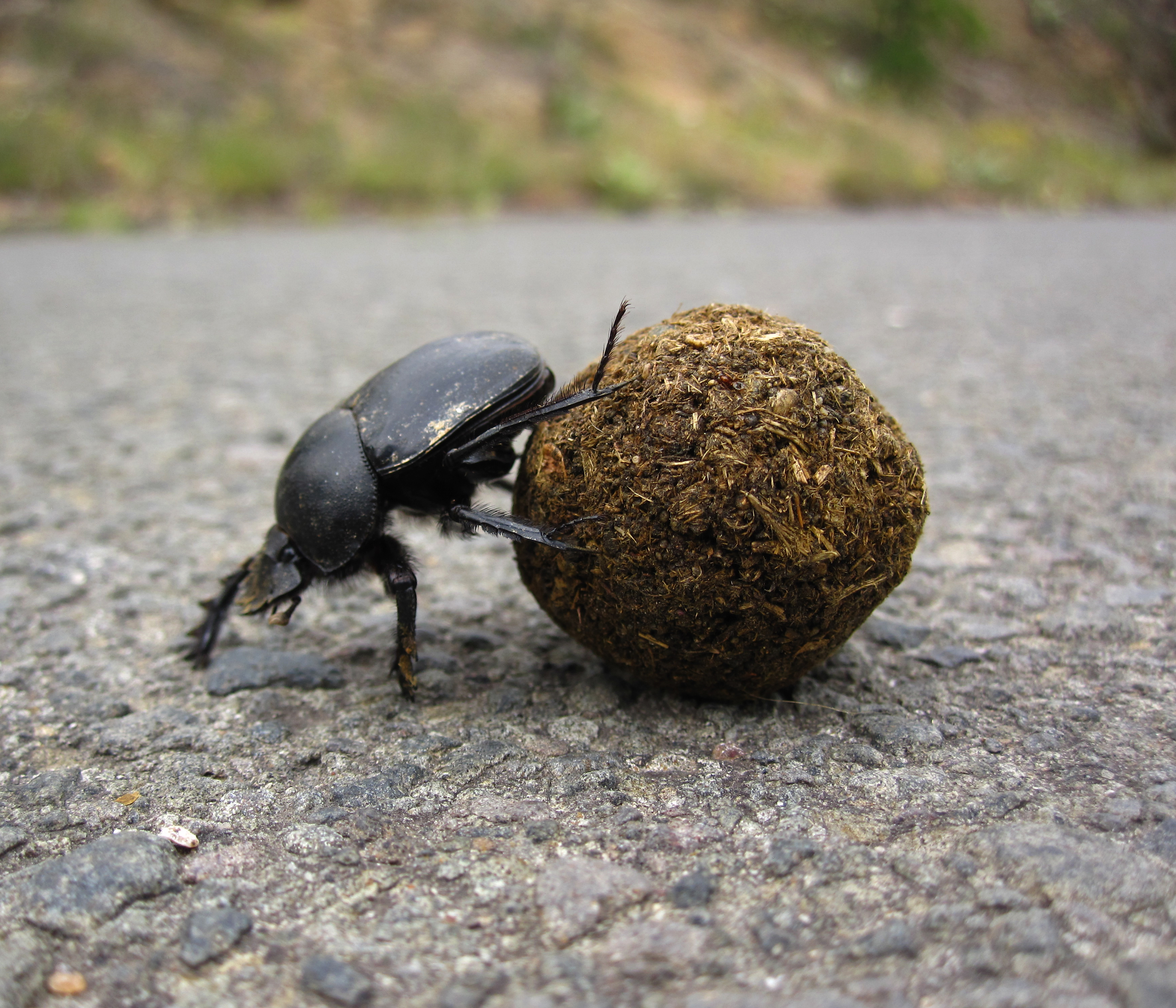 Лепешкар (анг. Dung beetle) од фамилијата Scarabaeus - Мариово, во близина на Разинбегов Мост и Црна Река.